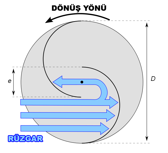 Savonius Rüzgar Türbini, çalışma prensibi şeması.